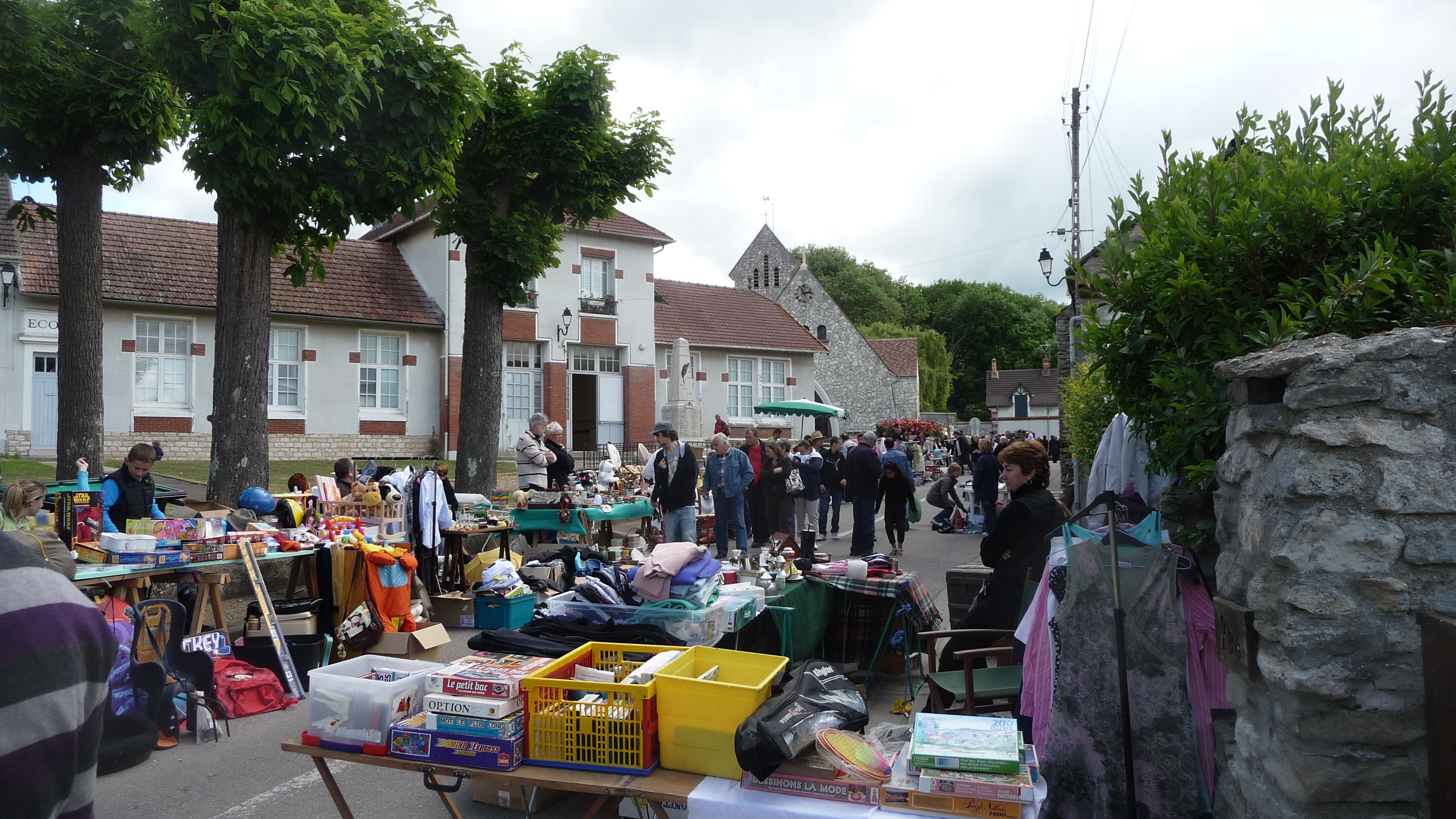 Jour de brocante à Guitrancourt (Yvelines, France).